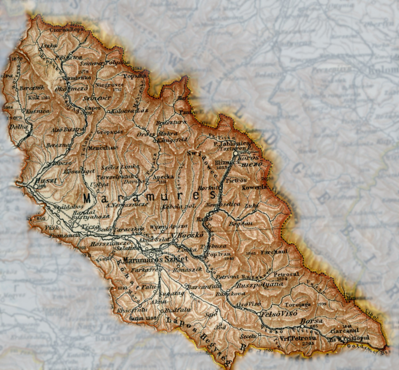 Marmatia